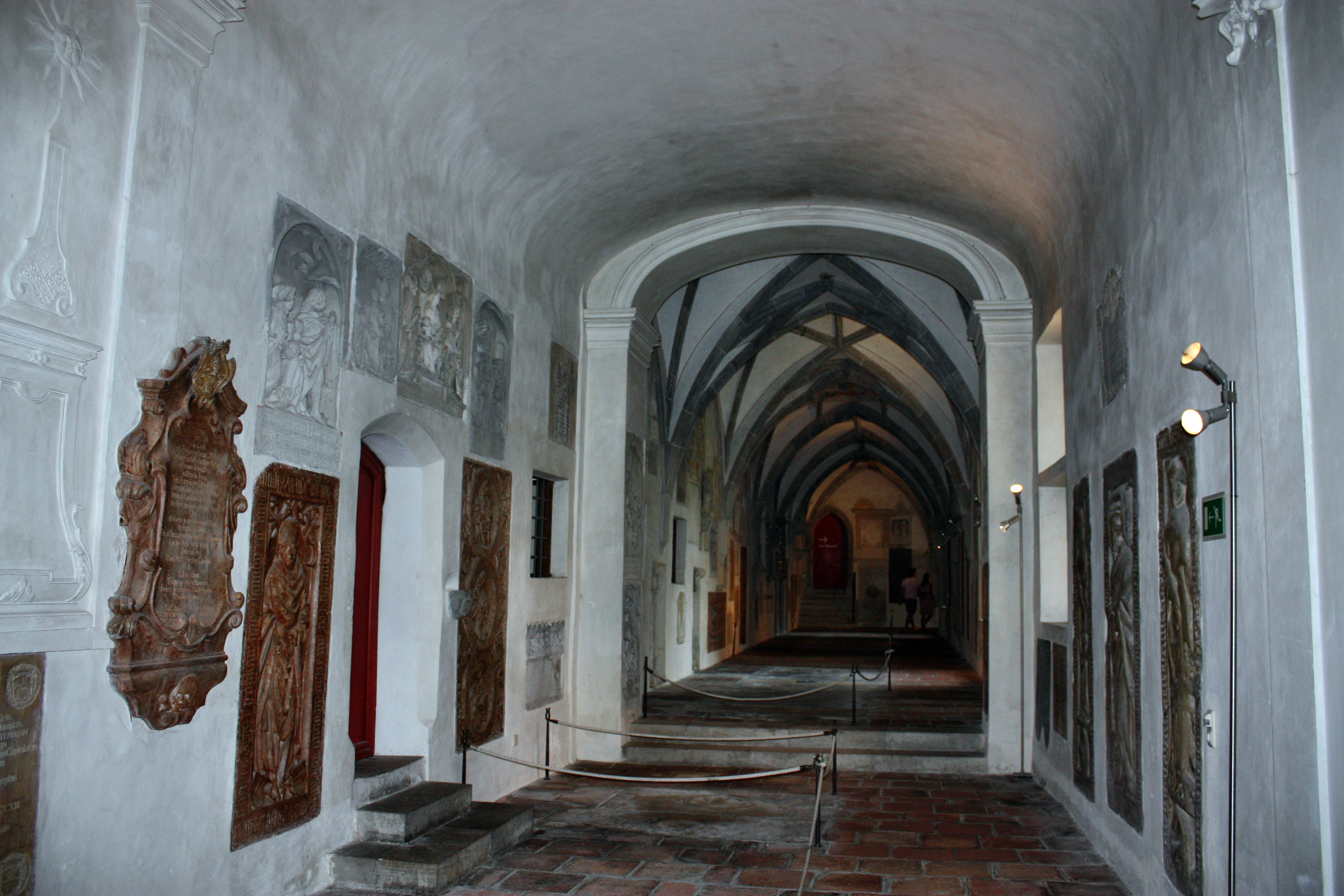 Dom Unserer Lieben Frau, Augsburg